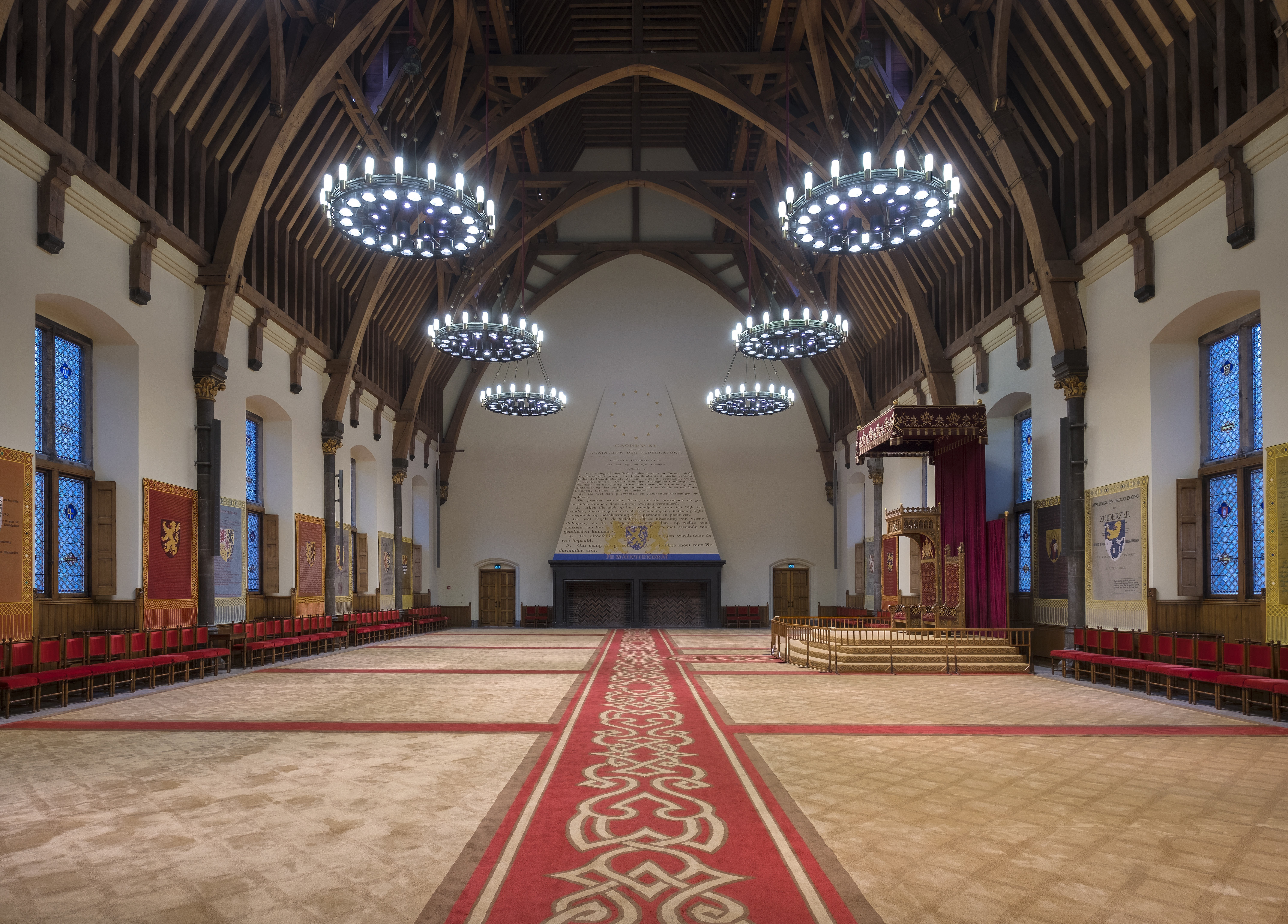 Ridderzaal, Binnenhof, Den Haag